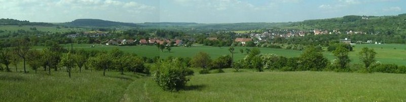 Gersheim: Panorama (Fotomontage)